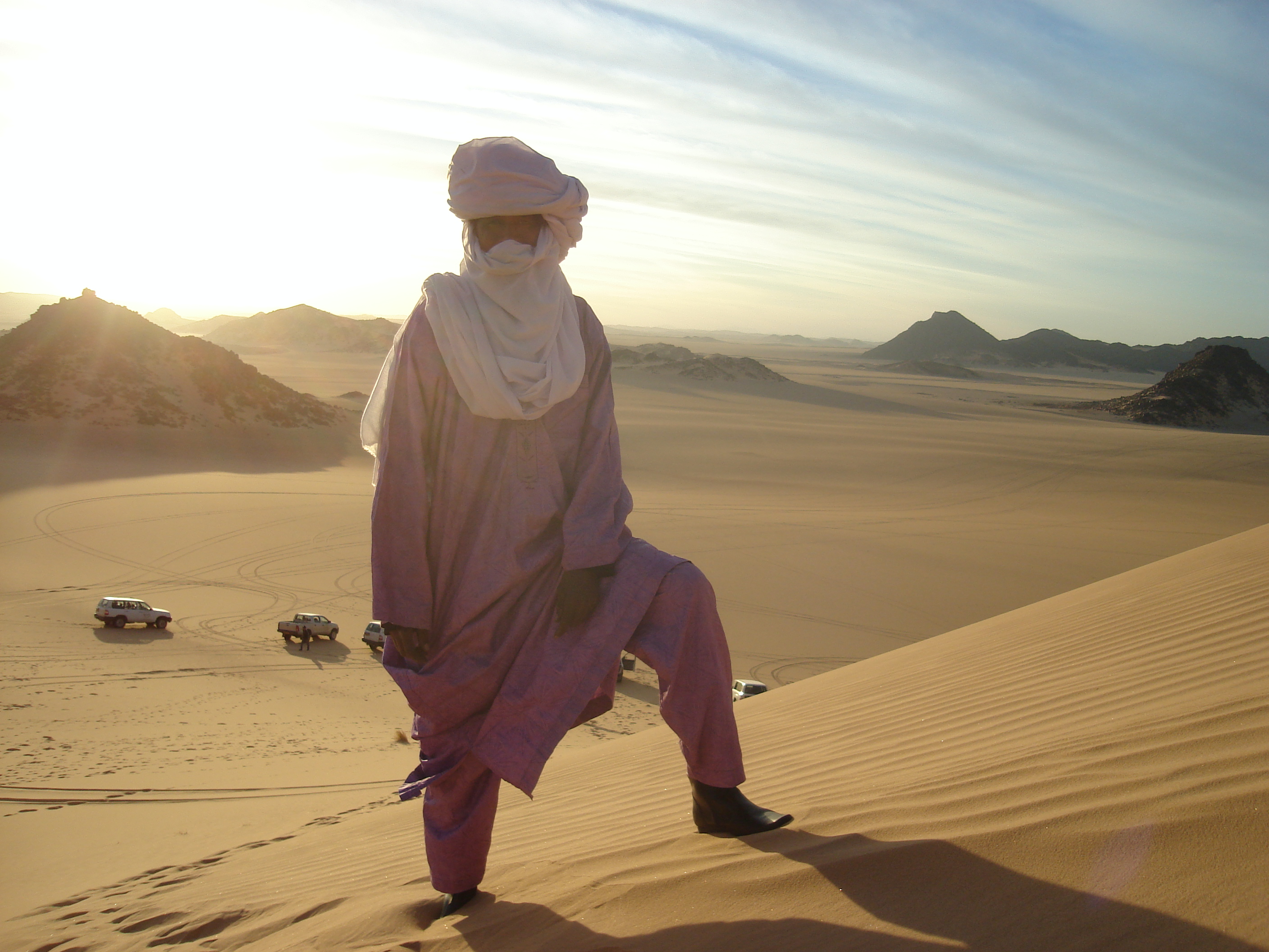 Cette photo est celle s'un Tergui (singulier de Touareg, hommes du desert). Cette photo a été prise à Djanet (wilaya d'Illizi) dans le sud de l'Algérie.